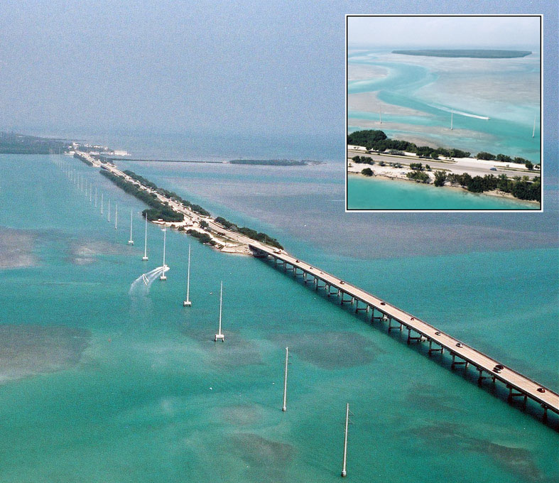 Florida Keys - bird's eye view